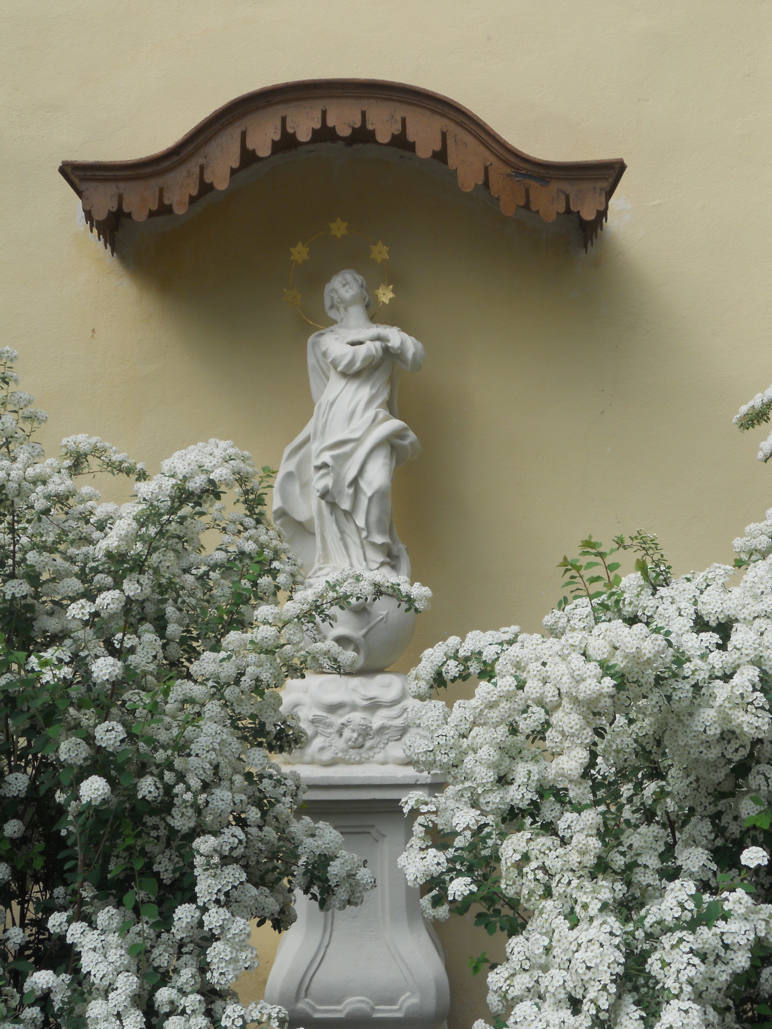 Maria Immaculata an der Stammersdorfer Pfarrkirche